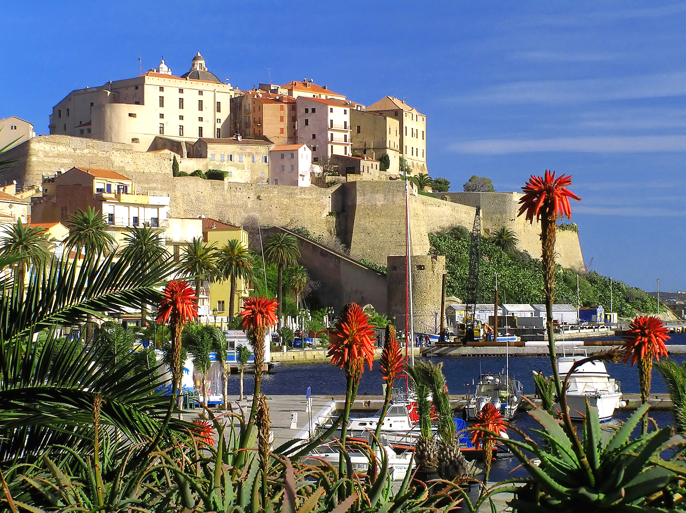 Civitas Calvi Semper Fidelis